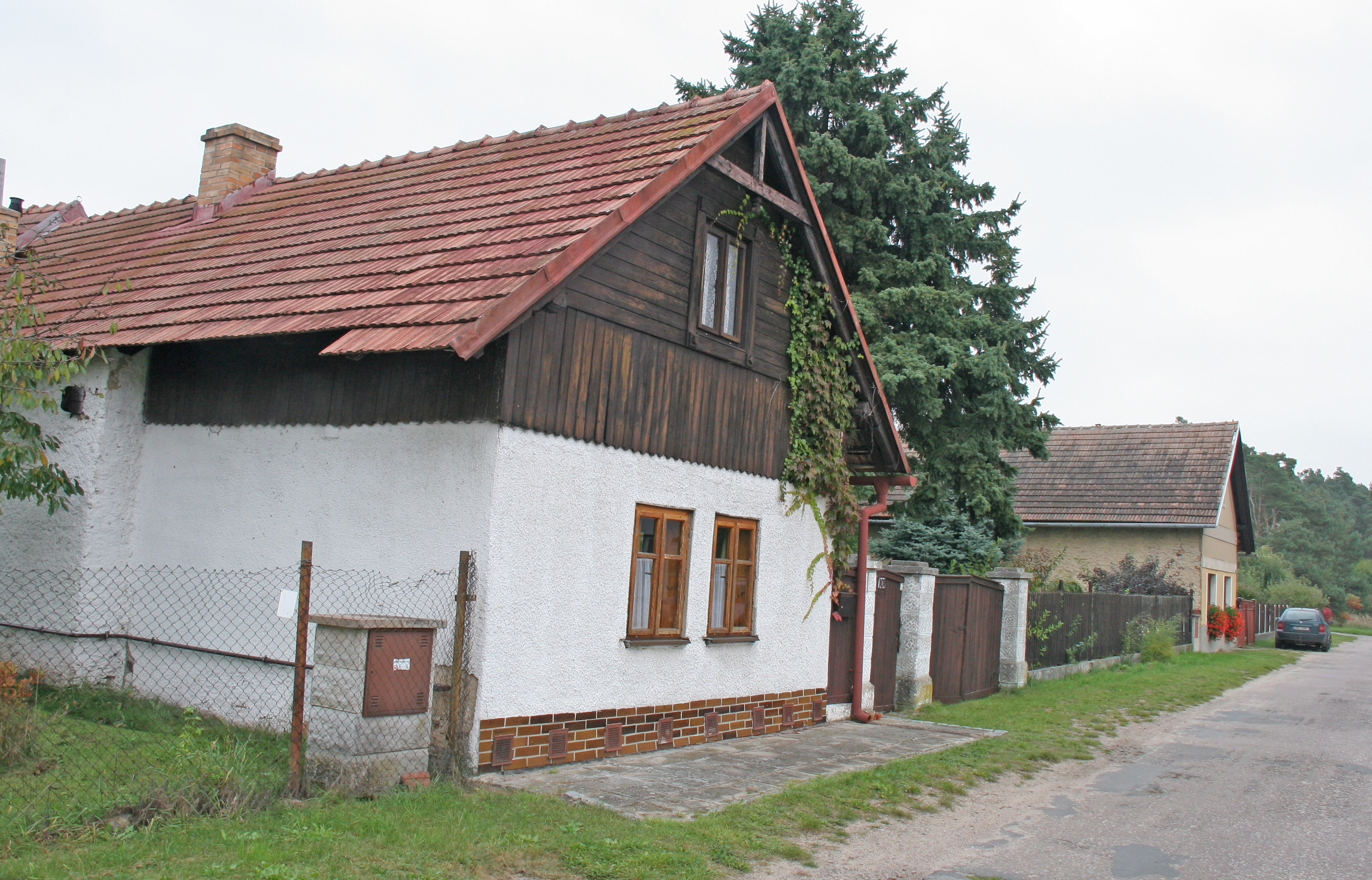 Hlavečník čp. 101